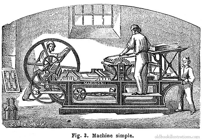 tiskař - historie